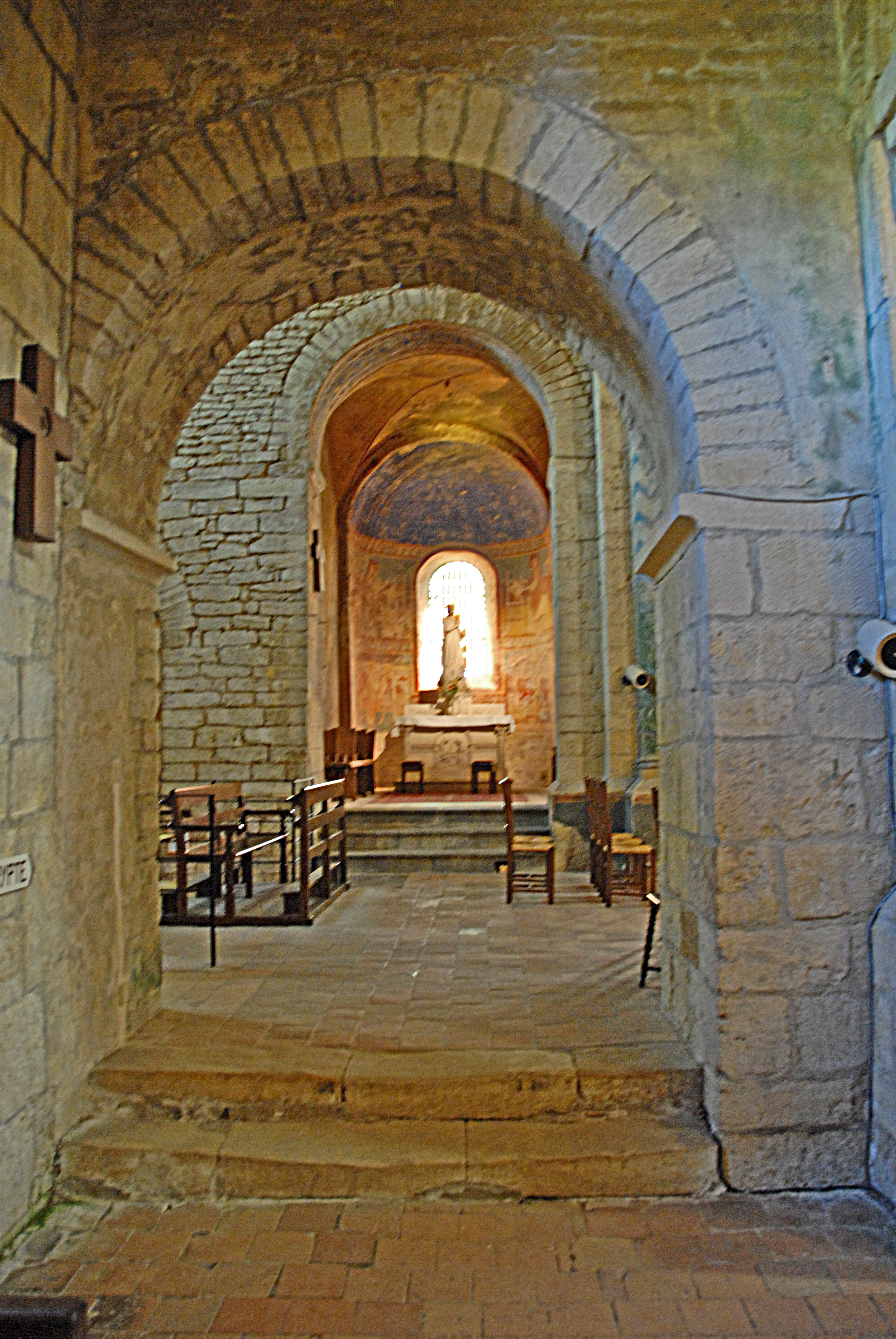 aus nördl. Seitenschiff in Querschiff